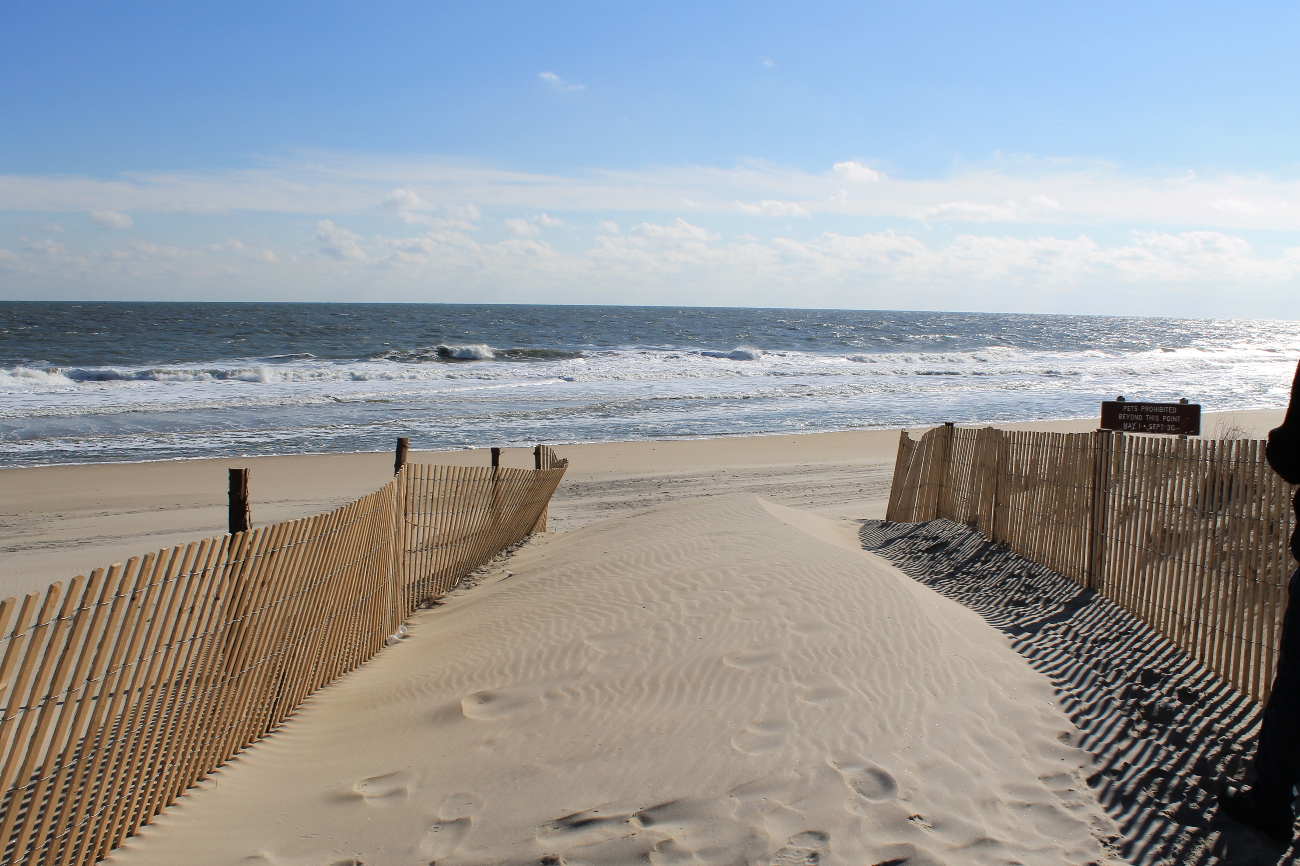 Fenwick Island State Park